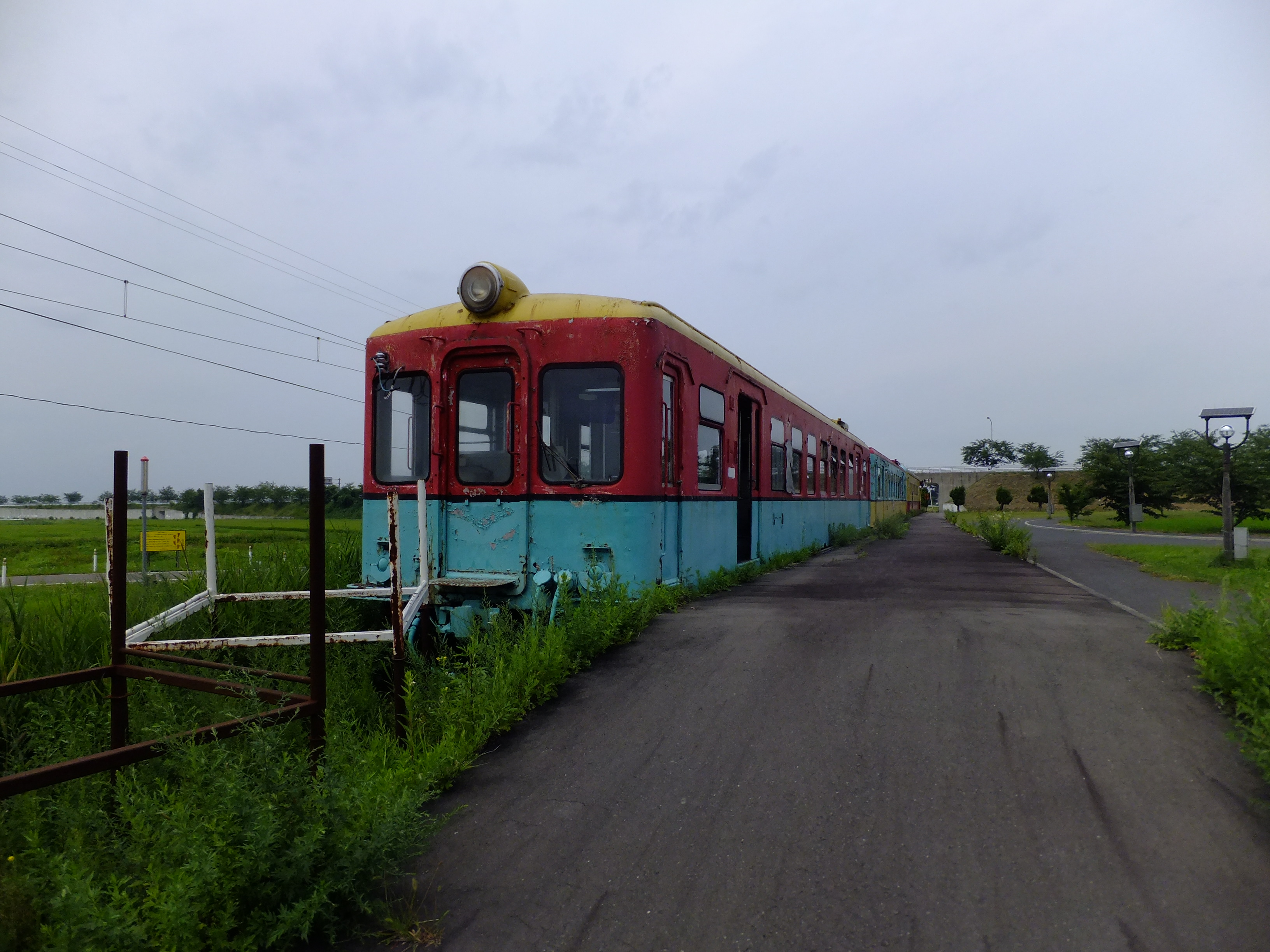 道の駅いなかだて「弥生の里」、弘南鉄道の廃車体が保存されている。2013年8月には「田んぼアート駅」が設置される予定。